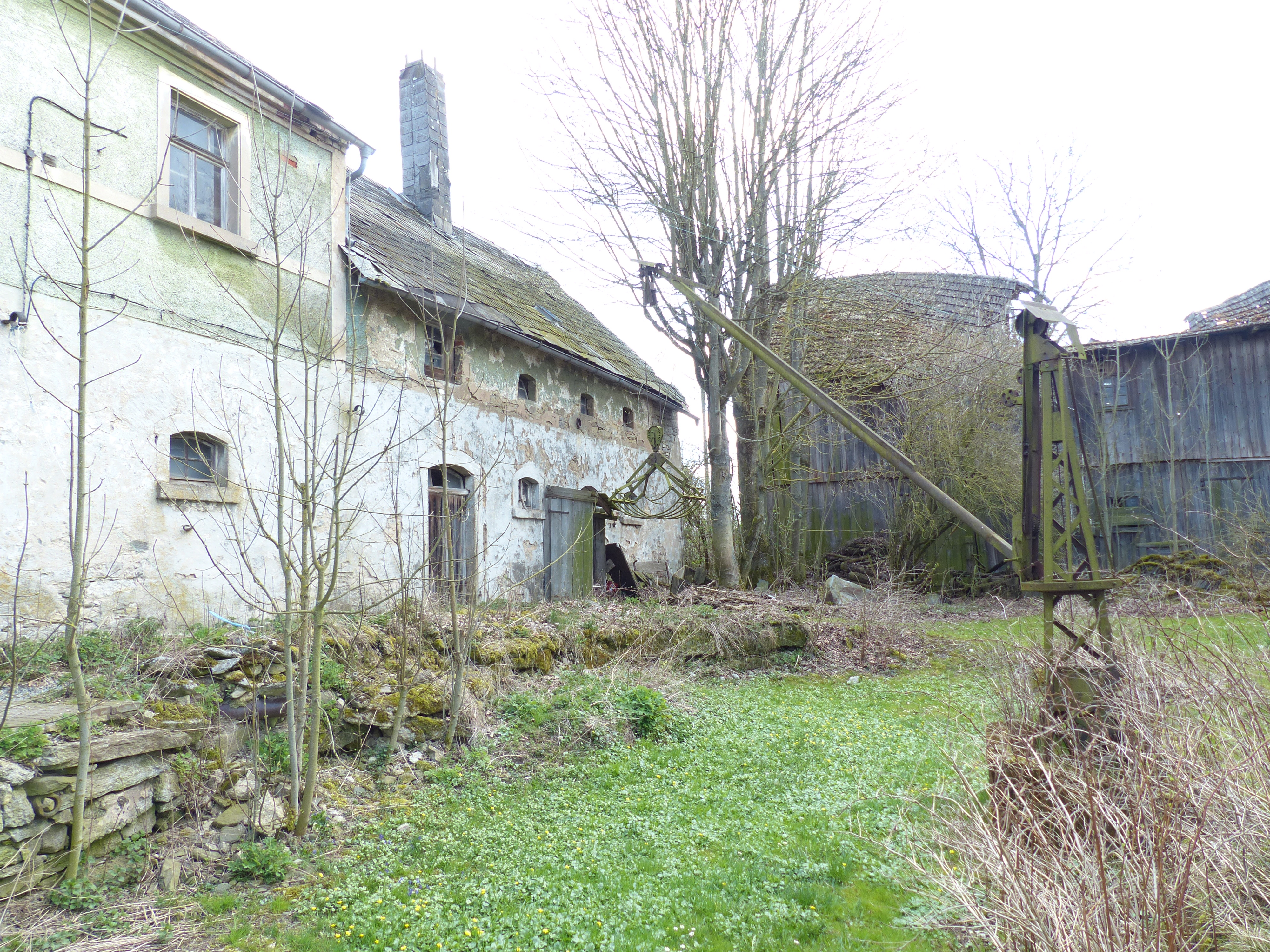 Verbliebener Bauernhof von Wieden, vormals Unterwieden